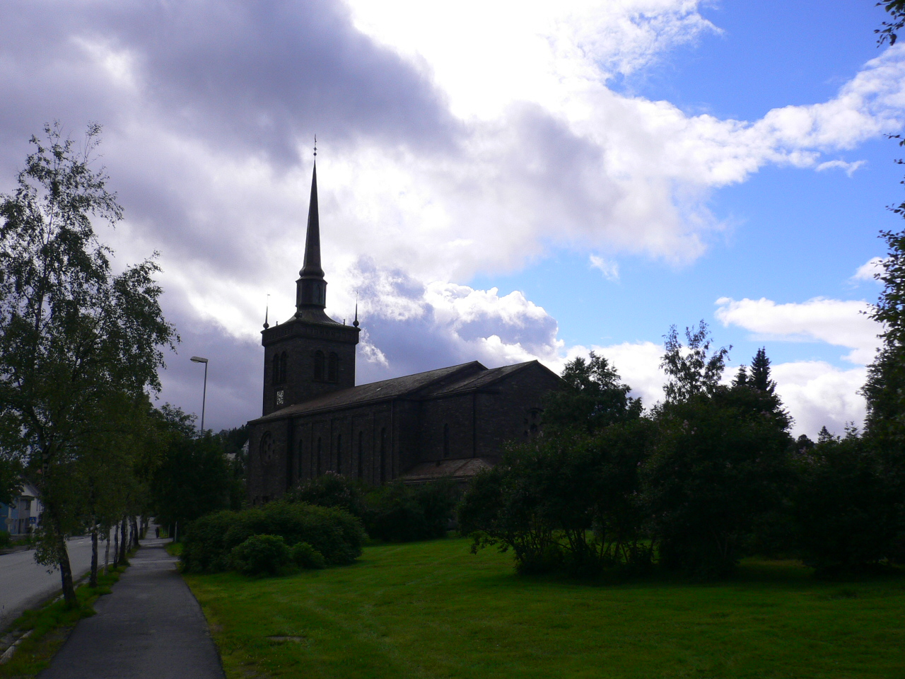 Narvik kyrkje